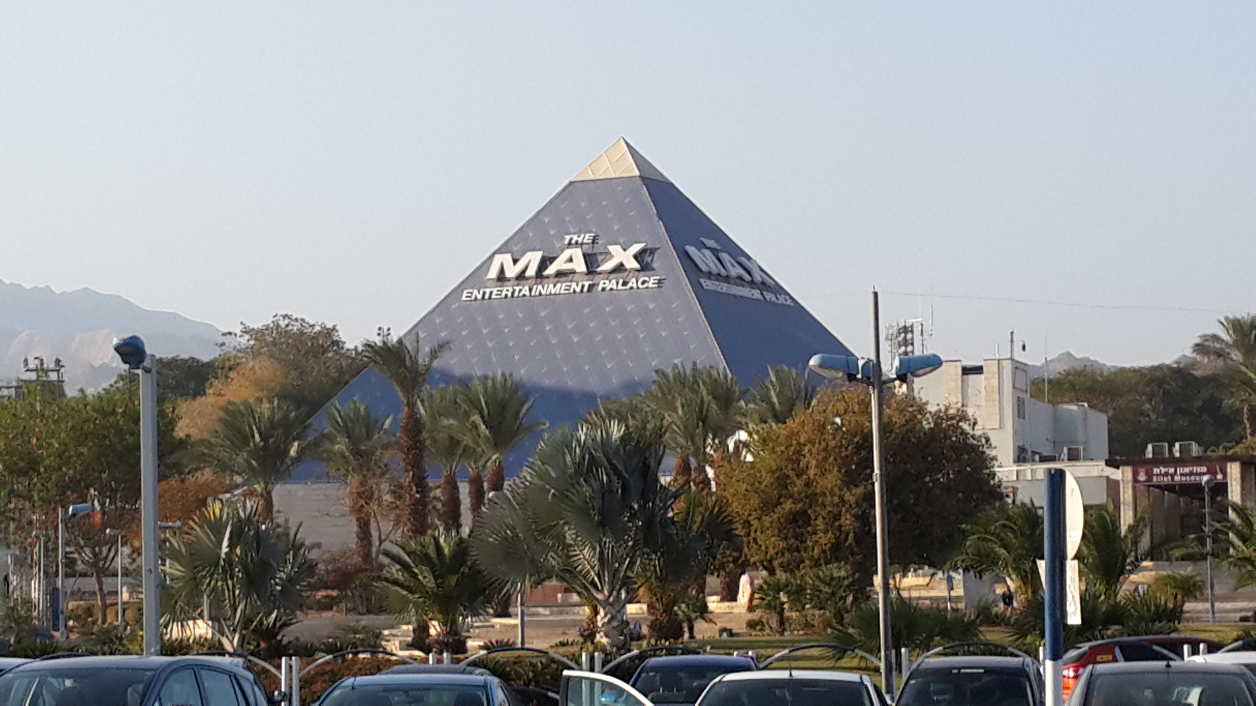 Эйлат в январе 2014